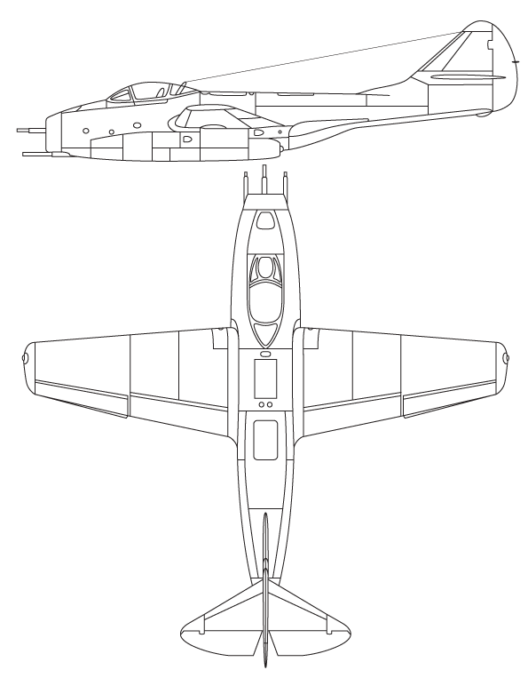 MiG-9 3-view_drawing